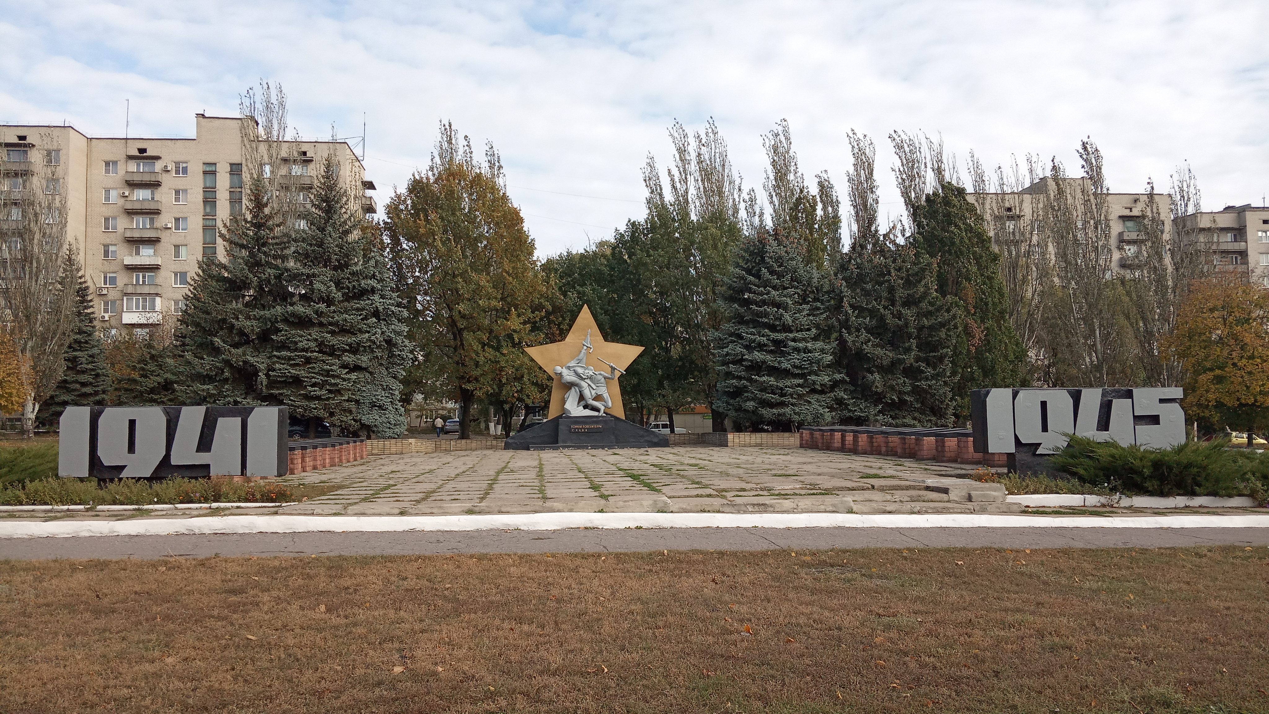 Пам'ятник воїнам-визволителям та воїнам-землякам, Селидове, вул. Карла Маркса, 8